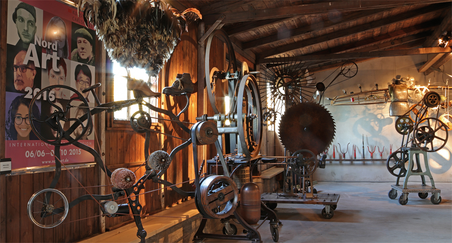 Einblick in die Kunstmaschinenhalle (kurz KMH) nahe der Stadt Remagen. Es handelt sich bei der KMH um eine Dauerausstellung mit Kunstmaschinen des Künstlers Willi Reiche.